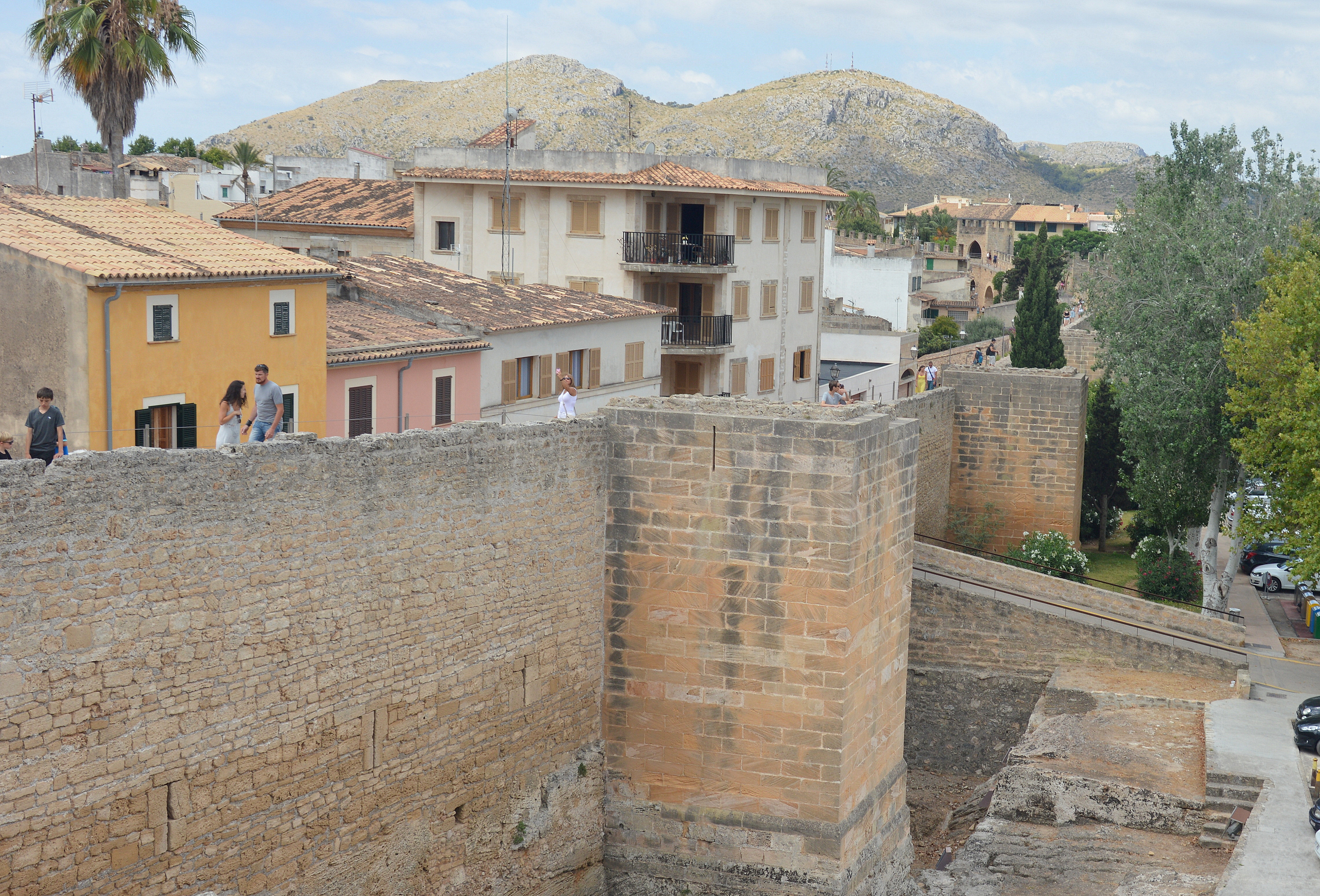 Stadtbefestigung von Alcudia